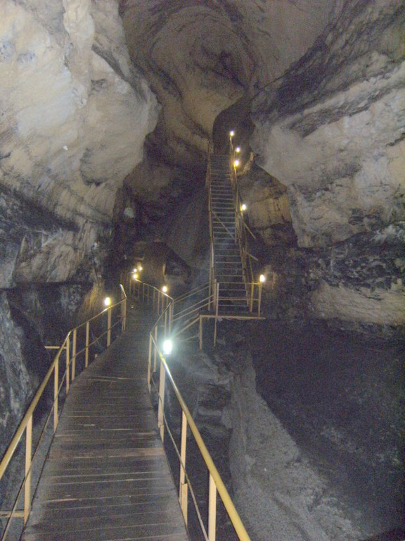 Tınaztepe Mağarası